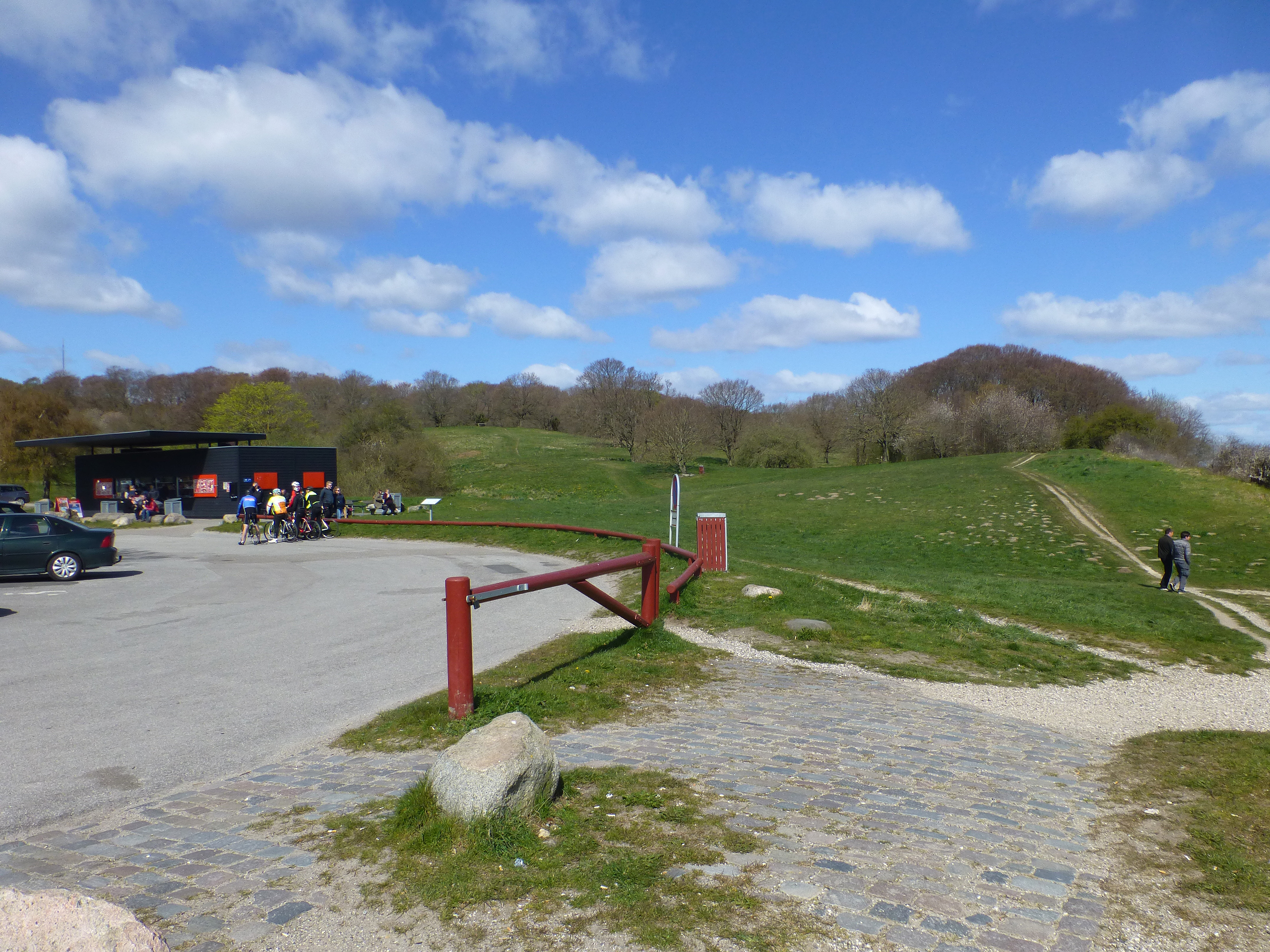 Strandmarken ved Moesgaard Strand